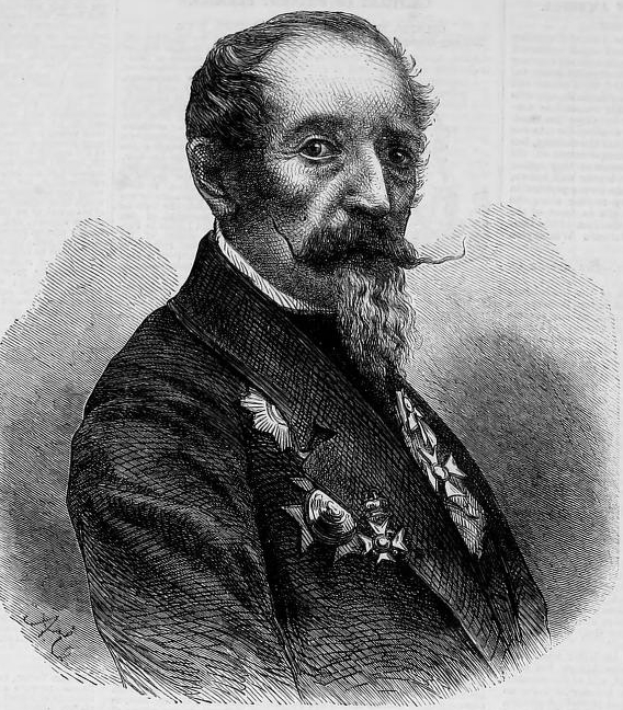 Horace Vernet